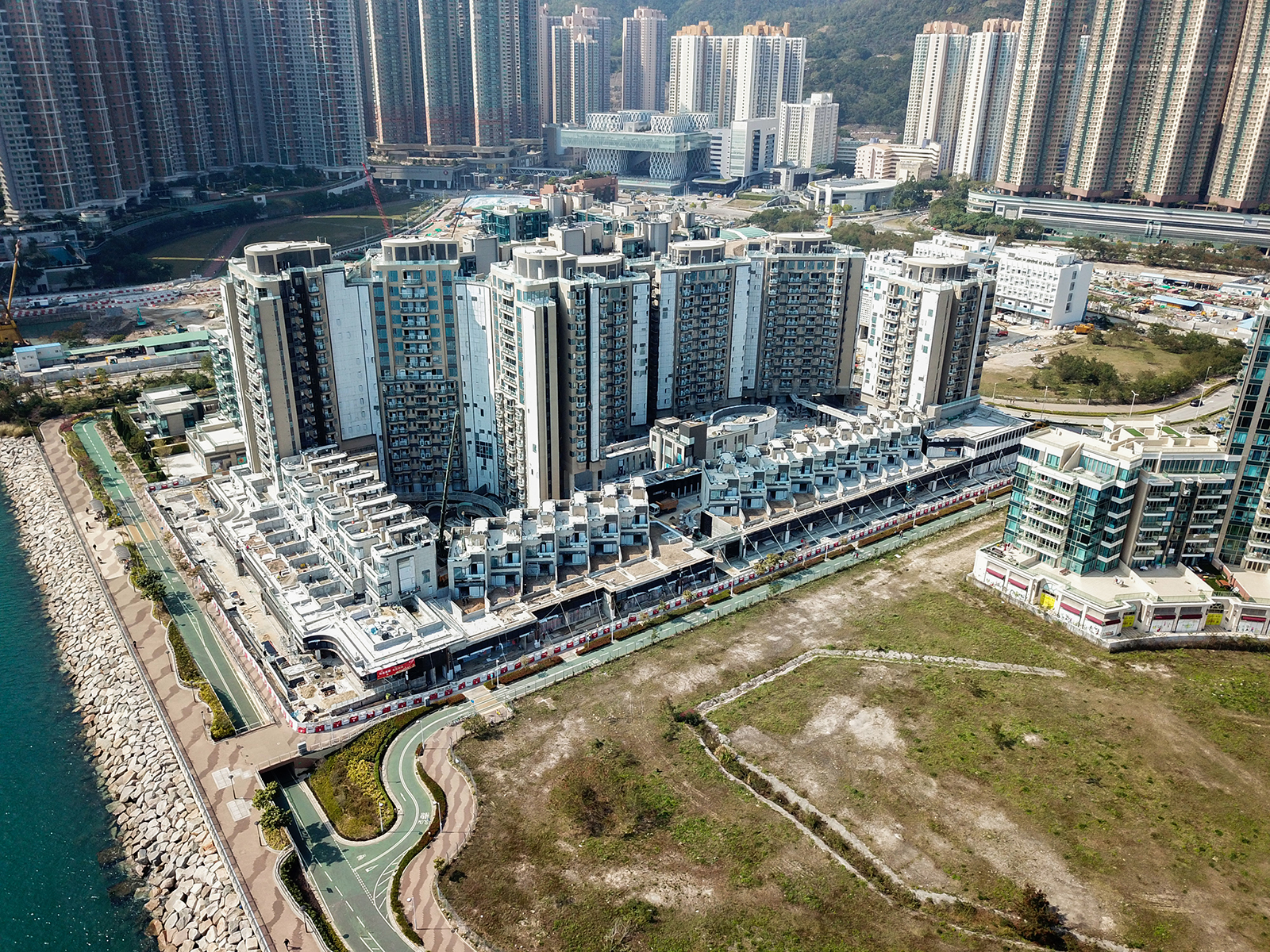 Alto Residences